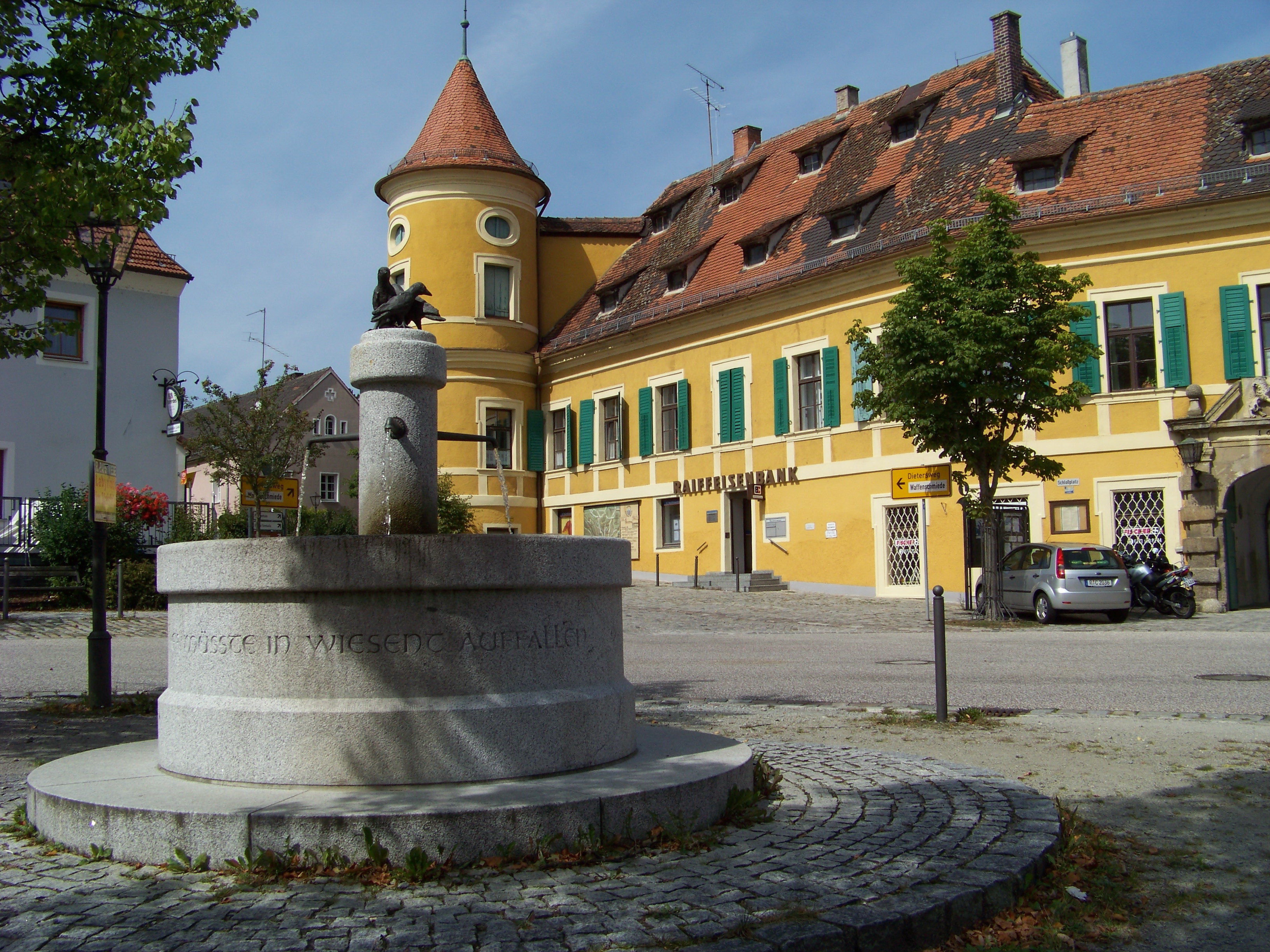 Wiesent. Schloßplatz 1. Schloss, gegliederte Mehrflügelanlage, Südflügel zweigeschossiger Walmdachbau mit geknickter Fassade, Ecktürmen und gewölbter Durchfahrt mit rustiziertem Portal, bez. 1695. Die Umschrift auf dem Brunnenrand lautet: "Und fiele jemand vom Himmel. Er müsste er in Wiesent auffallen." Oben auf der Brunnensäule sitzen drei Raben, die Wappentiere von Wiesent.